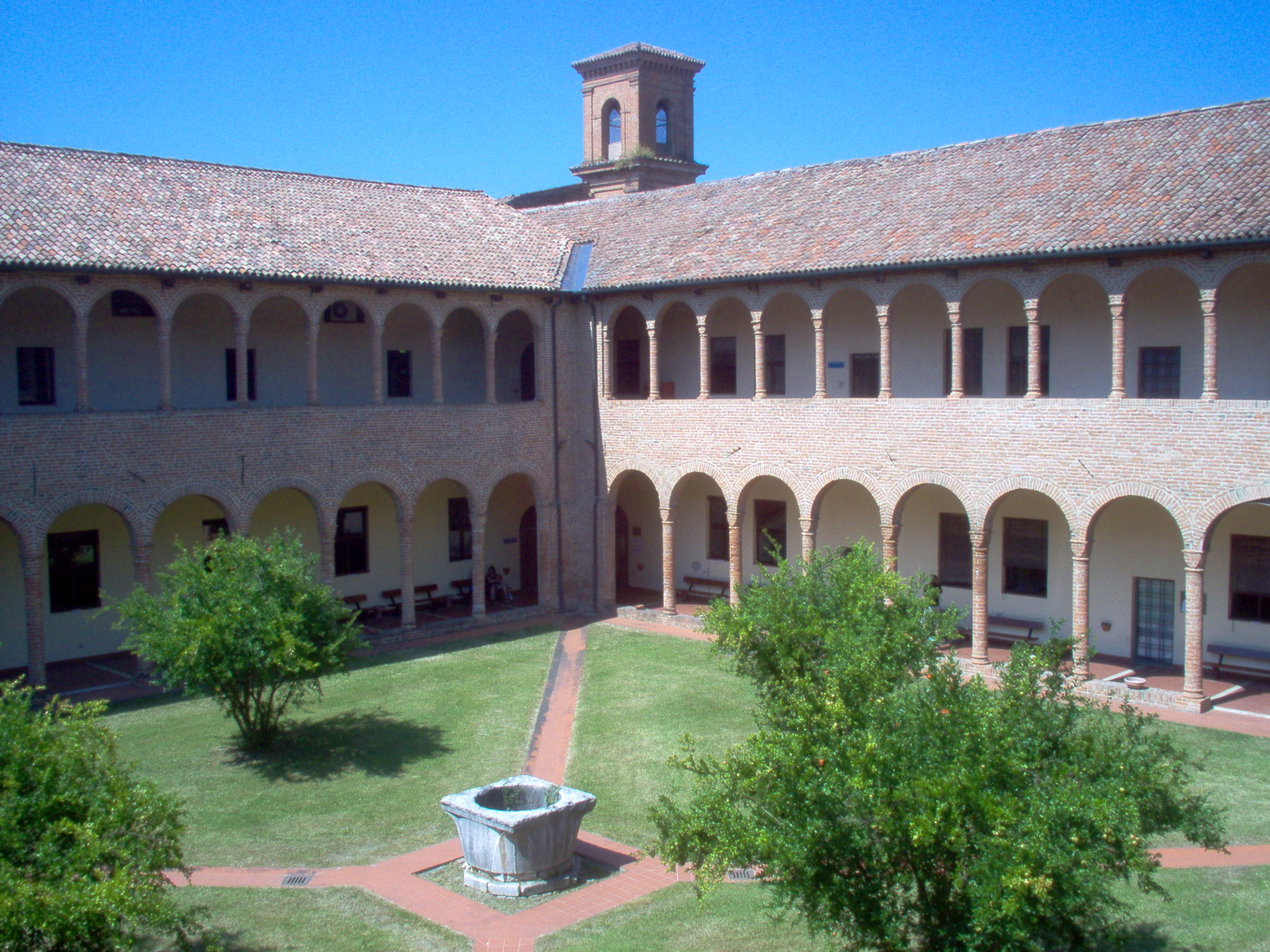 Chiostro interno - facoltà di farmacia - università di ferrara